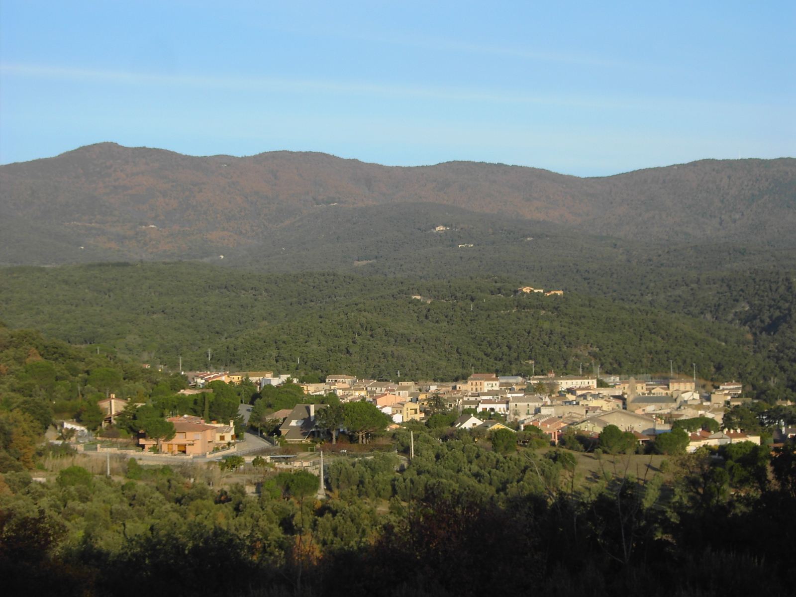 Vista general del núcleo de Agullana, municipio de la comarca gerundense del Alto Ampurdán.